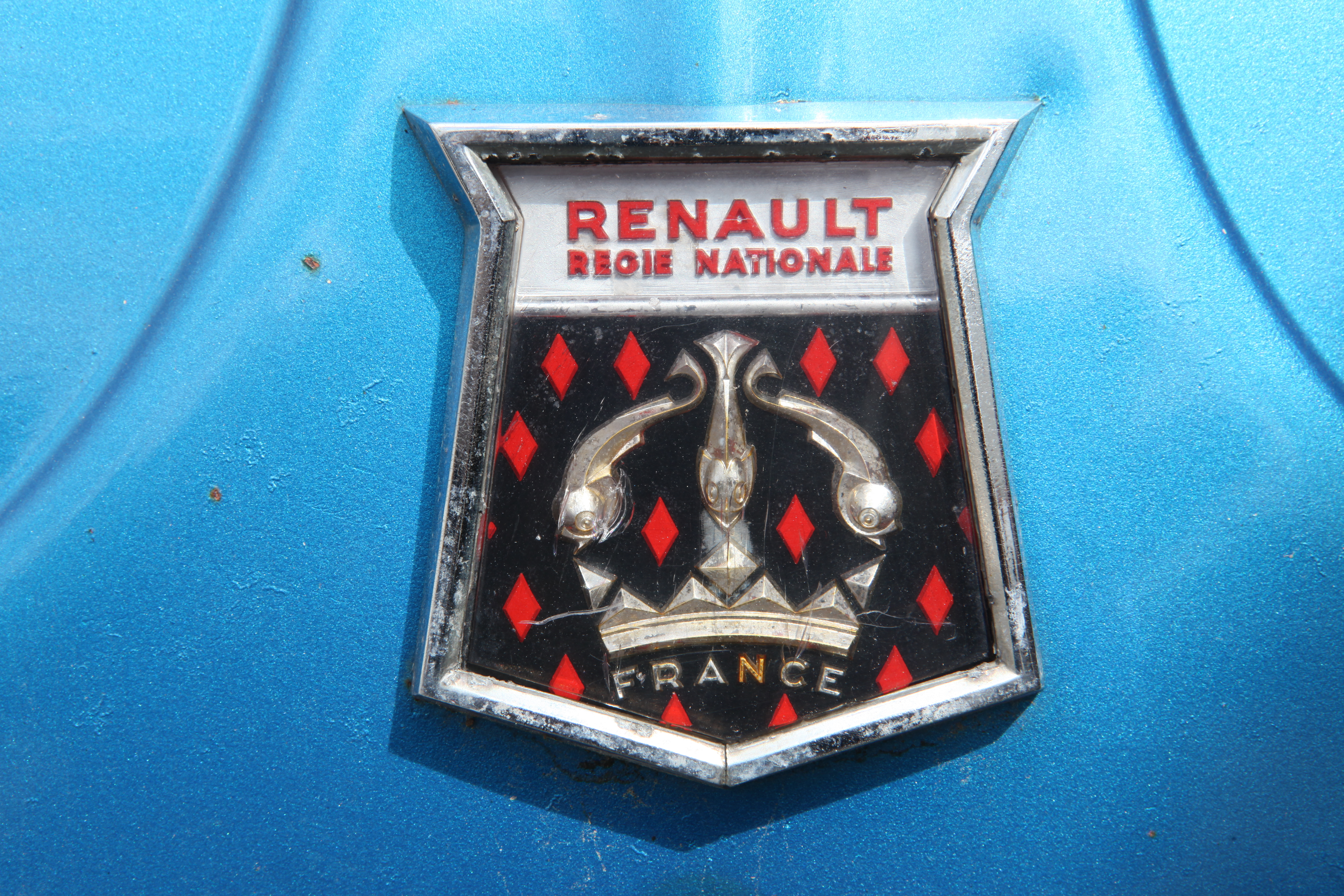 Renault Dauphine